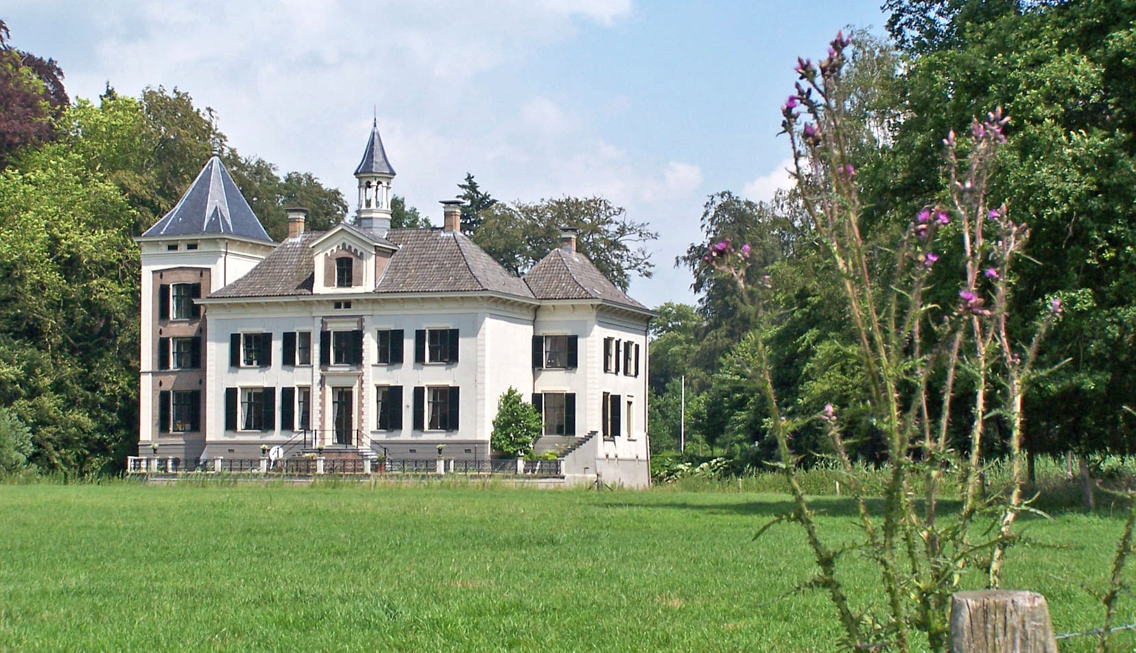 House 'De Haere' near Olst, Netherlands